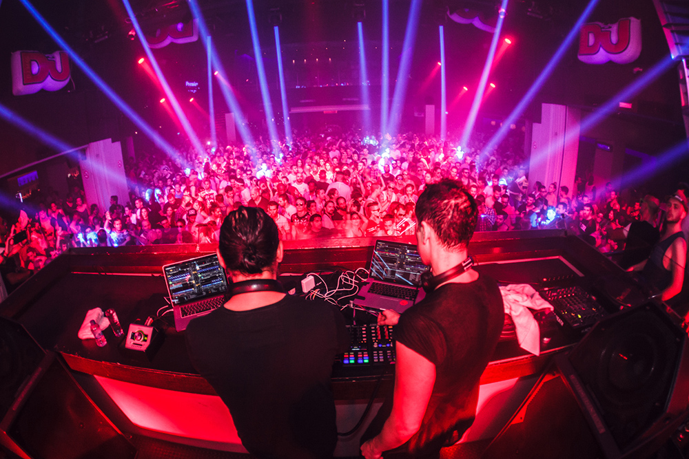 Space Ibiza Main Room